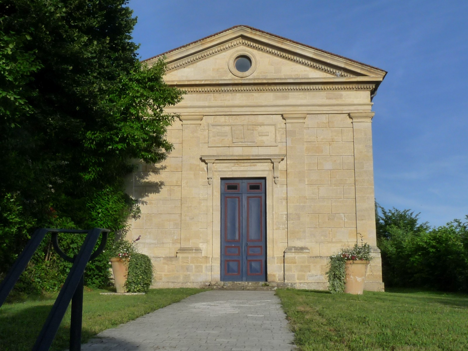 Ancien temple protestant, La Roche-Chalais, Dordogne, France